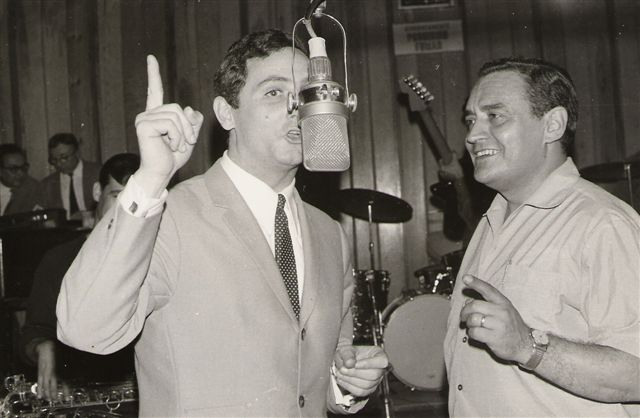 Florenci Mauné estrevistat, l'any 1966, per Salvador Escamilla a l'espai de Ràdio Barcelona Radioscope